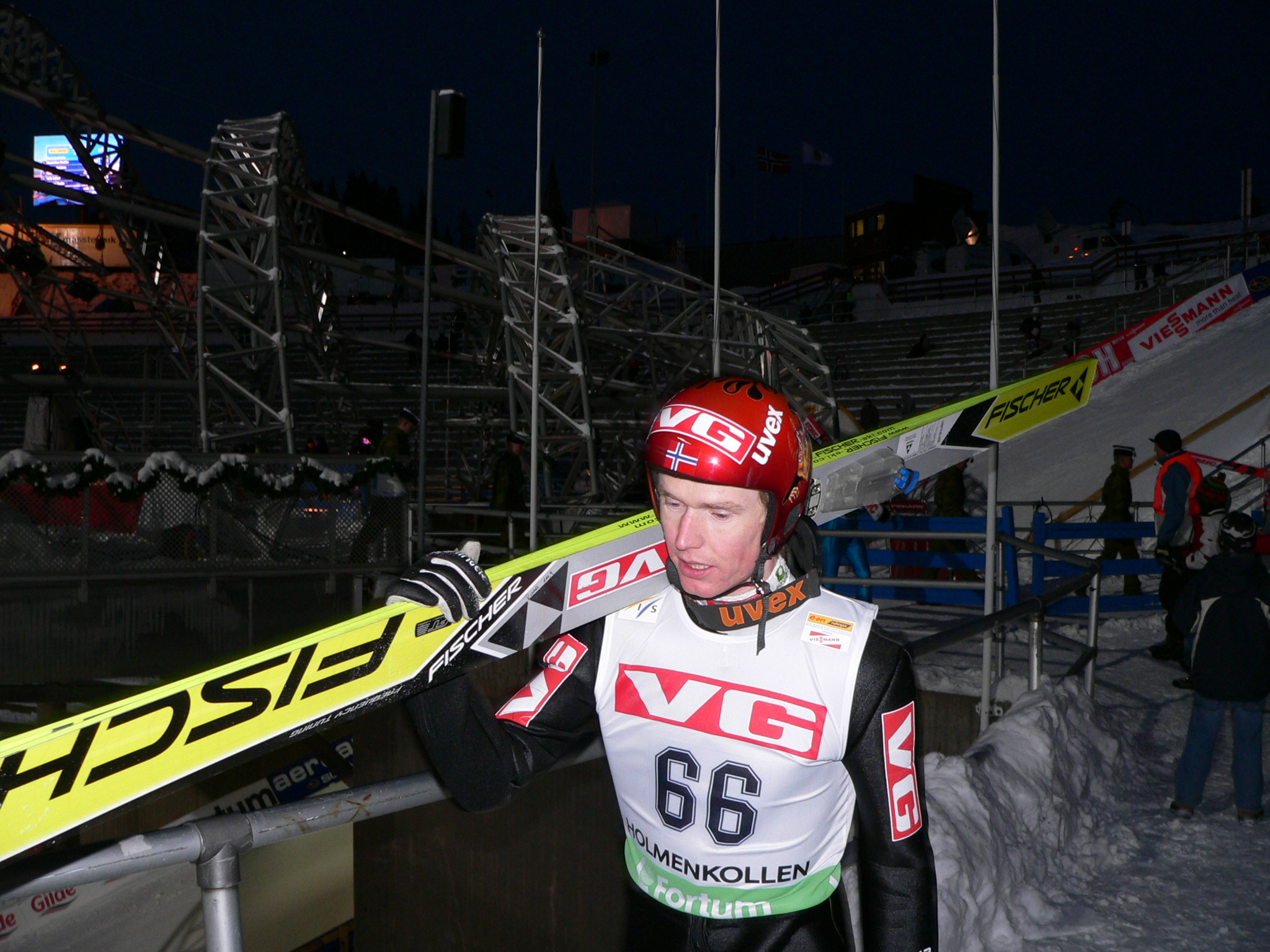 Taken at Holmenkollen, Norway